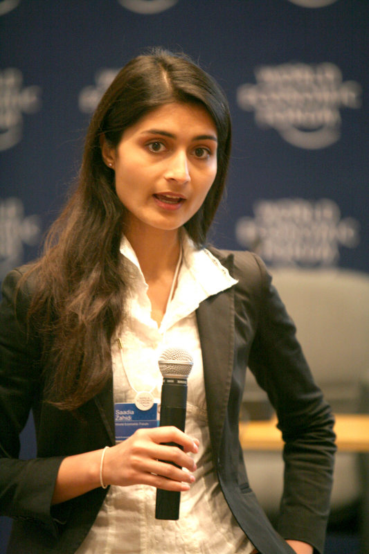 Saadia Zahidi